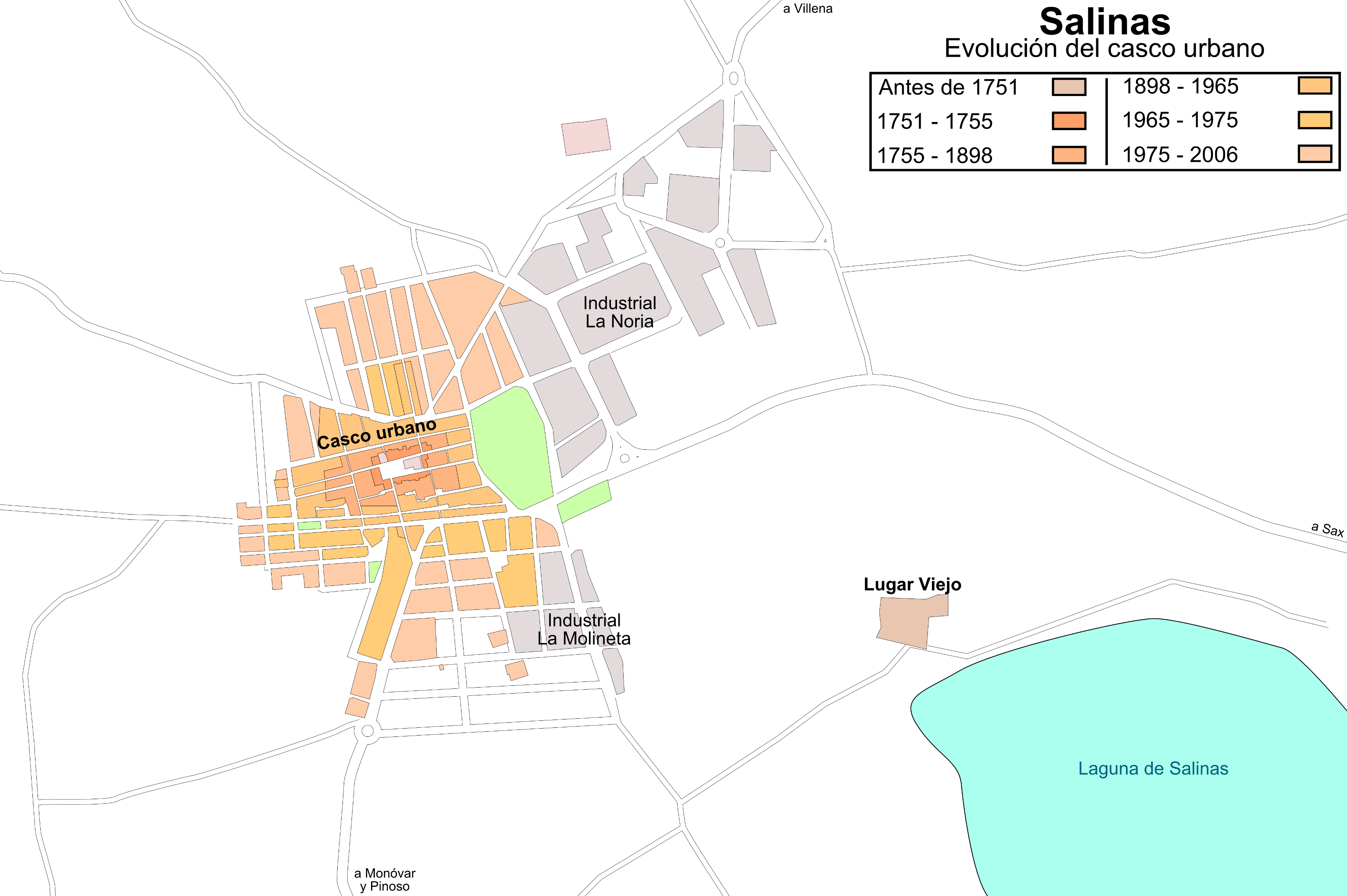 Evolució urbanística de les Salines (Alacant) entre 1751 i 2006.